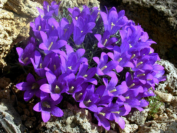 Plante en coussin de 5 à 10 cm, du Caucase, sur fissures et éboulis calcaire. (Photo en culture)